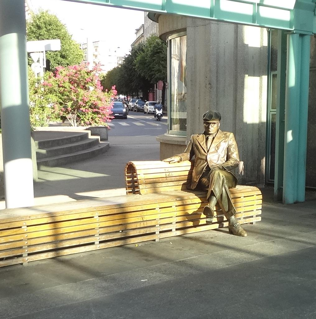 Rond-point de Plainpalais : statue en bronze sculptée par John Aldus et représentant André L'Huillier.